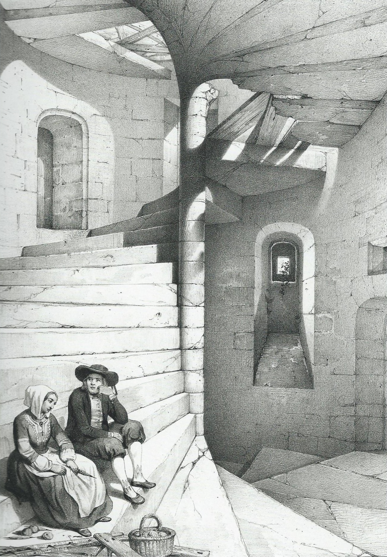 L'escalier du manoir de Kerautret (dessin d'Auguste Mayer paru dans "Voyages pittoresques et romantiques dans l'ancienne France, tome Bretagne, 1846). Un doute subsiste sur le manoir représenté car il existe aussi un manoir de Kerautret à Landerneau)